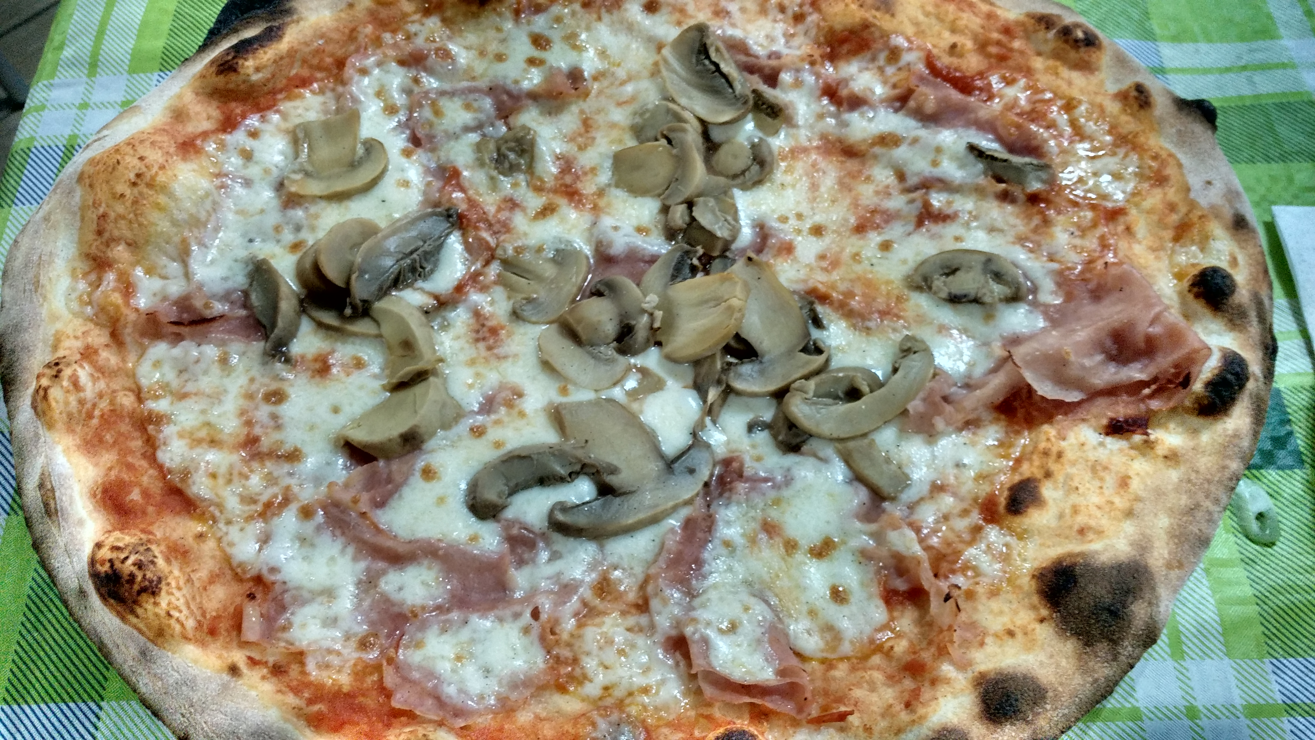 பீசா ஒயாசிஸ் என்னும் உணவகத்தில் வழங்கப்படும் காளான் பீசா, எசினோ லாரியோ, இத்தாலி.